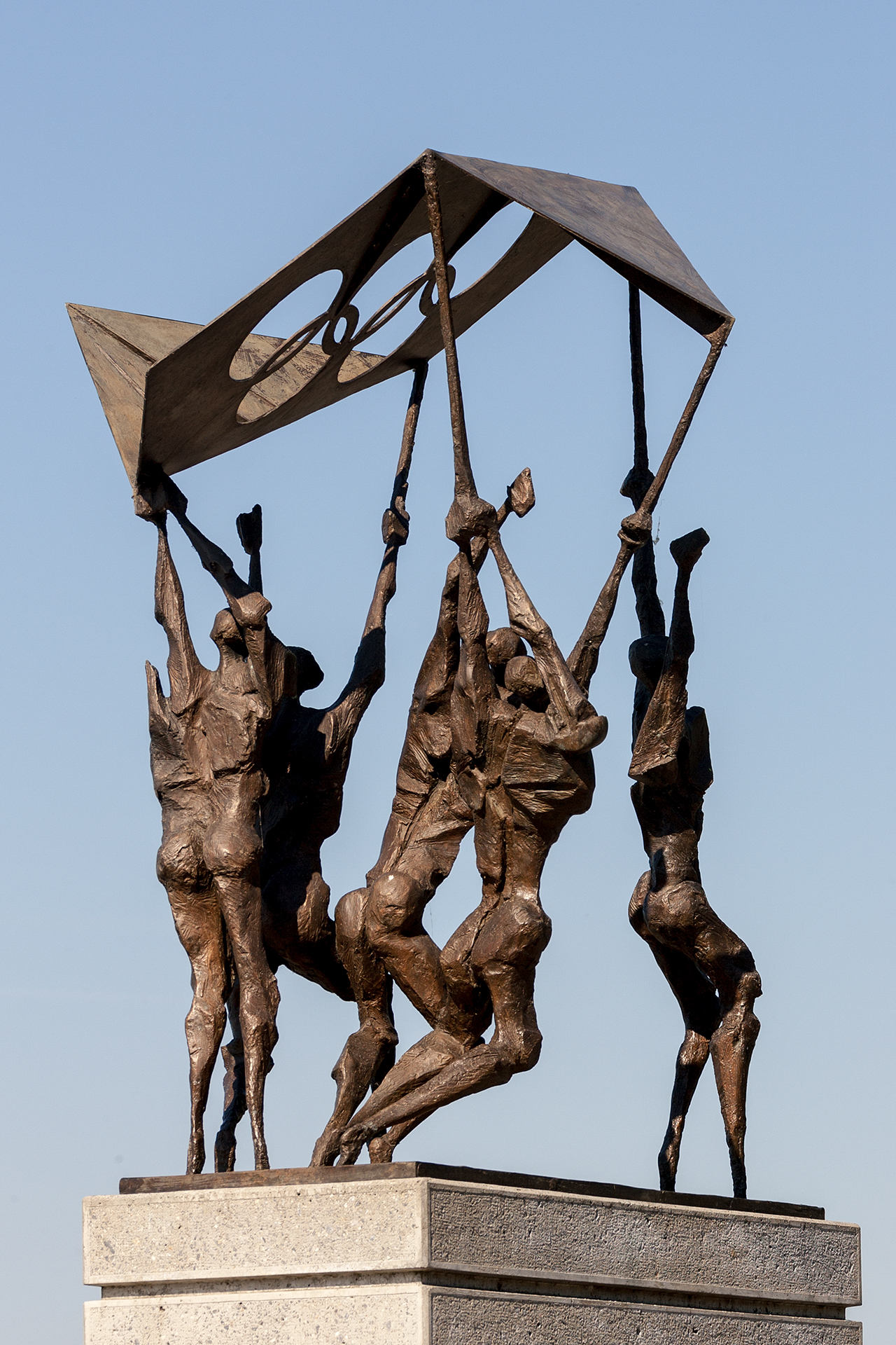 Skulptur am Quai vor dem Musée Olympique in Lausanne